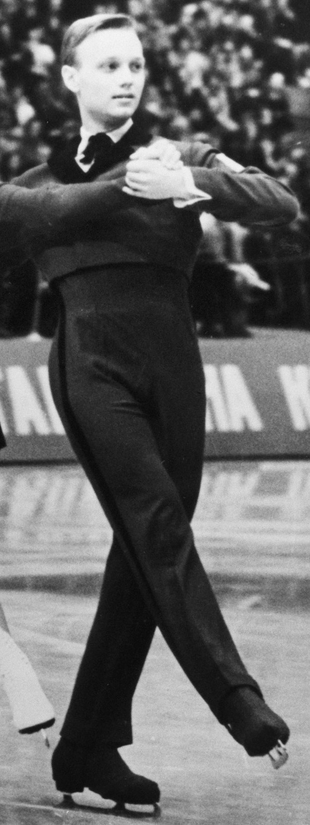 Eva Romanova en Pavel Roman in actie bij het paardansen. Foto is niet van het WK in Colarodo Springs maar van een ander evenement (zie cyrillisch schrift op boarding)